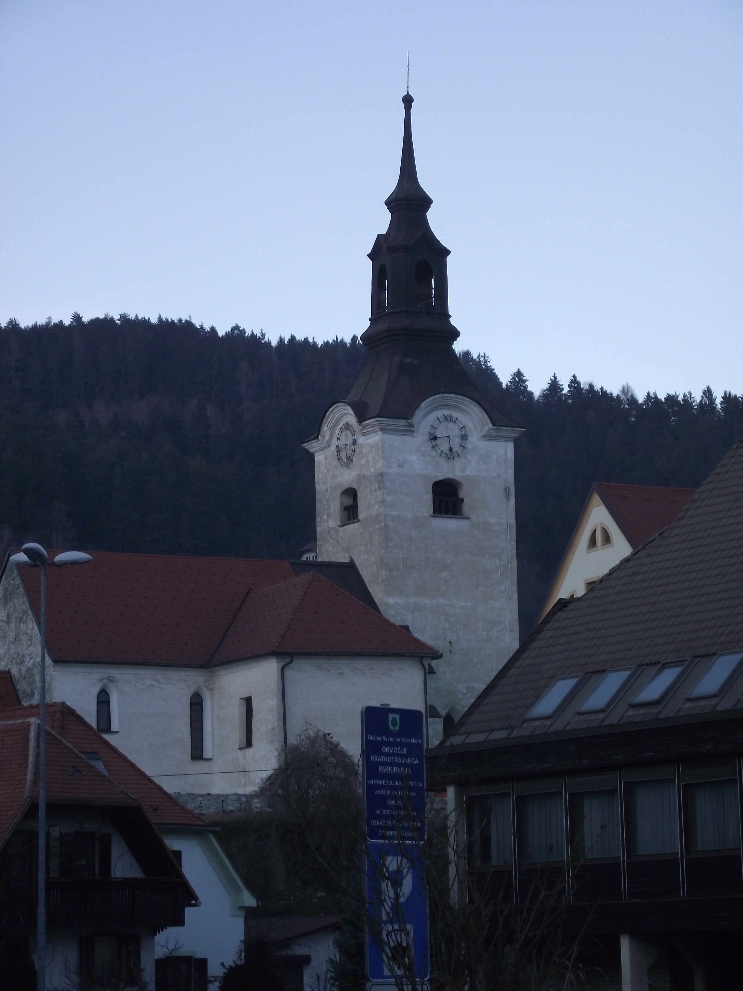 Ravne